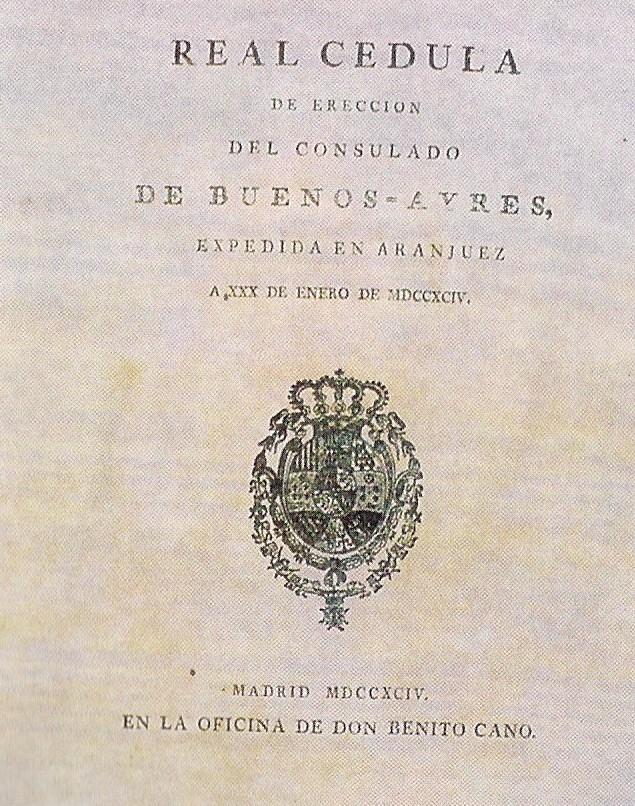 Portada de la Real Cédula de creación del Consulado de Buenos Aires, dada por el Rey en 1794, en su palacio de Aranjuez.